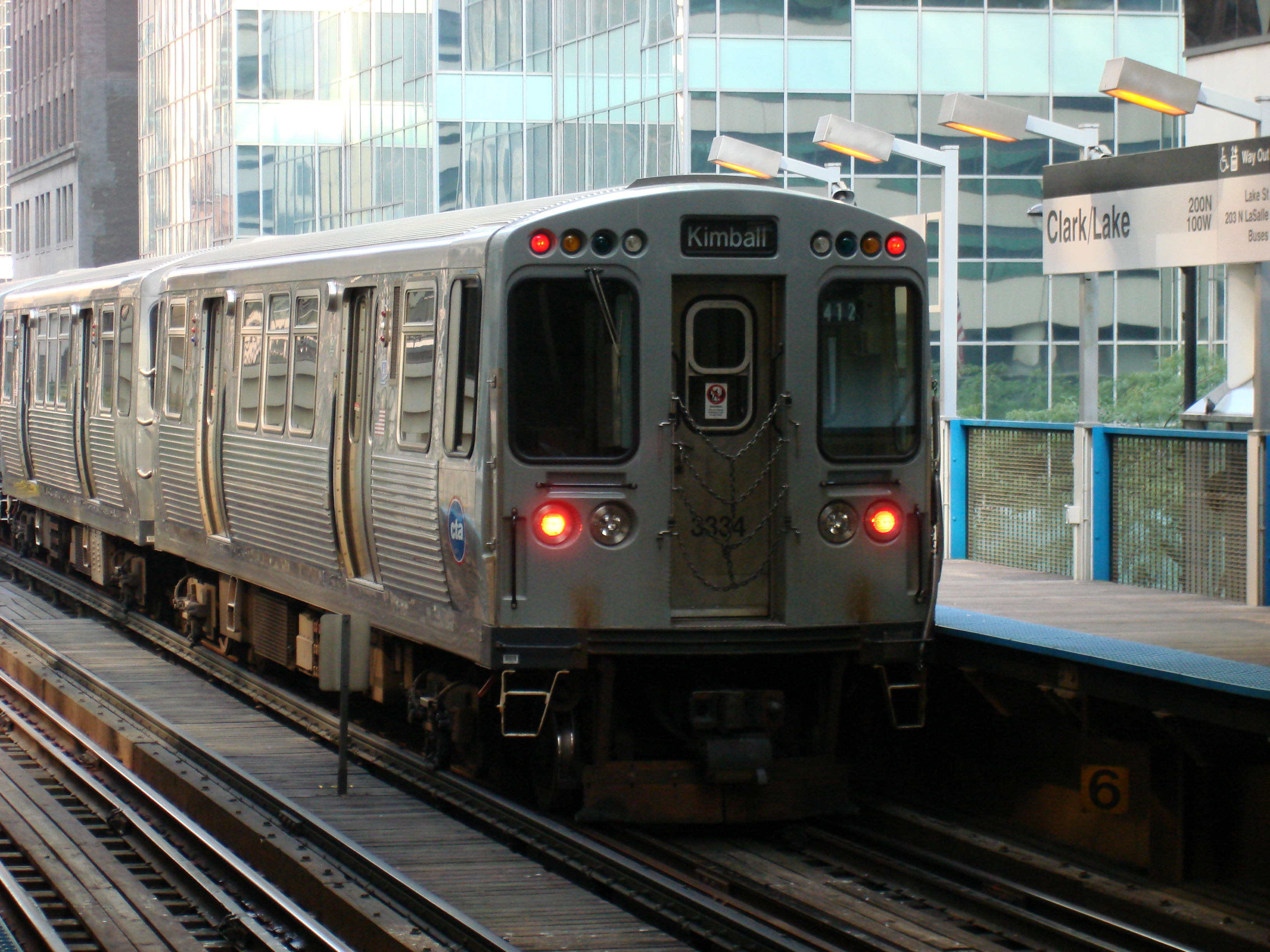 photo d'une rame vers Kimball